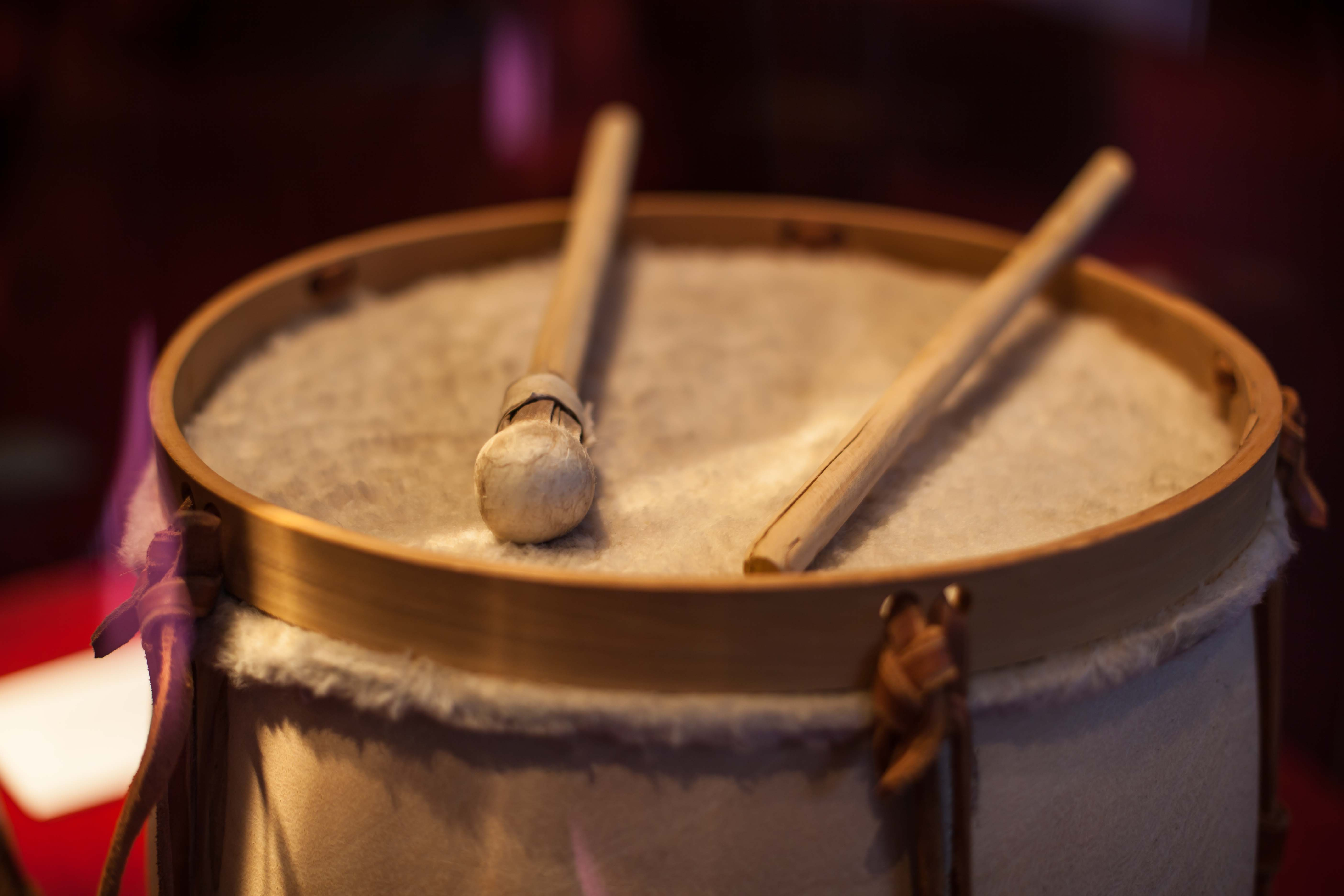 Bombo legüero al Museu de la Música de Barcelona